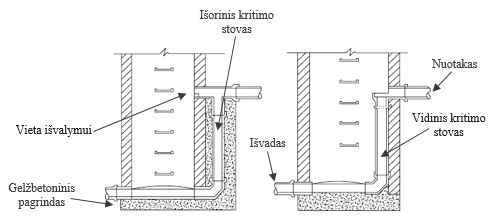 Gelžbetoniniai kritimo šuliniai su išoriniu (kairėje) ir vidiniu (dešinėje) kritimo stovais